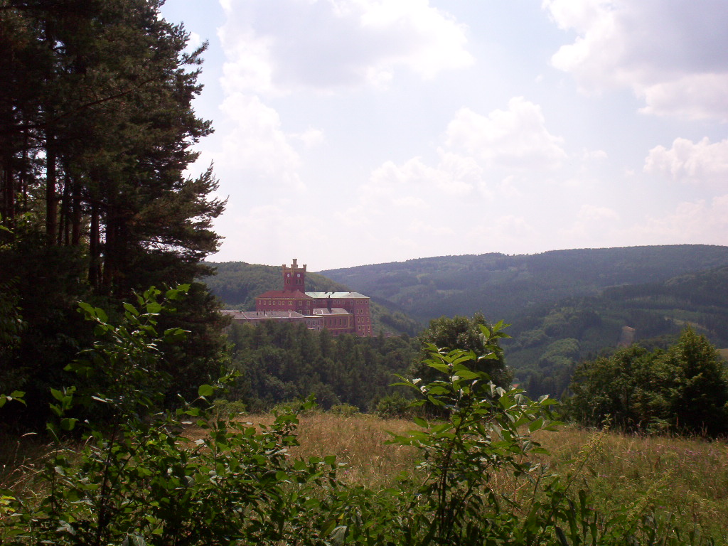 Fotografie mírovského hradu, věznice, focena dne 24.7.2003